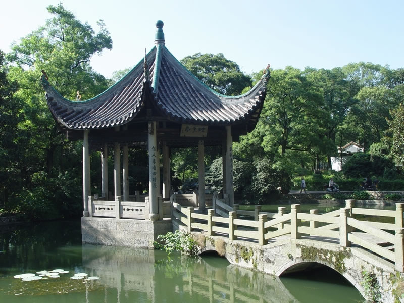 中文（中国大陆）: 吹香亭